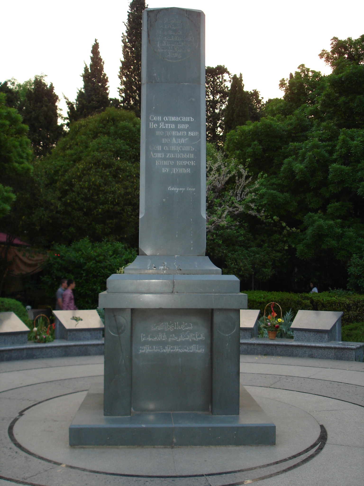 Ялта, Памятник переселения татар